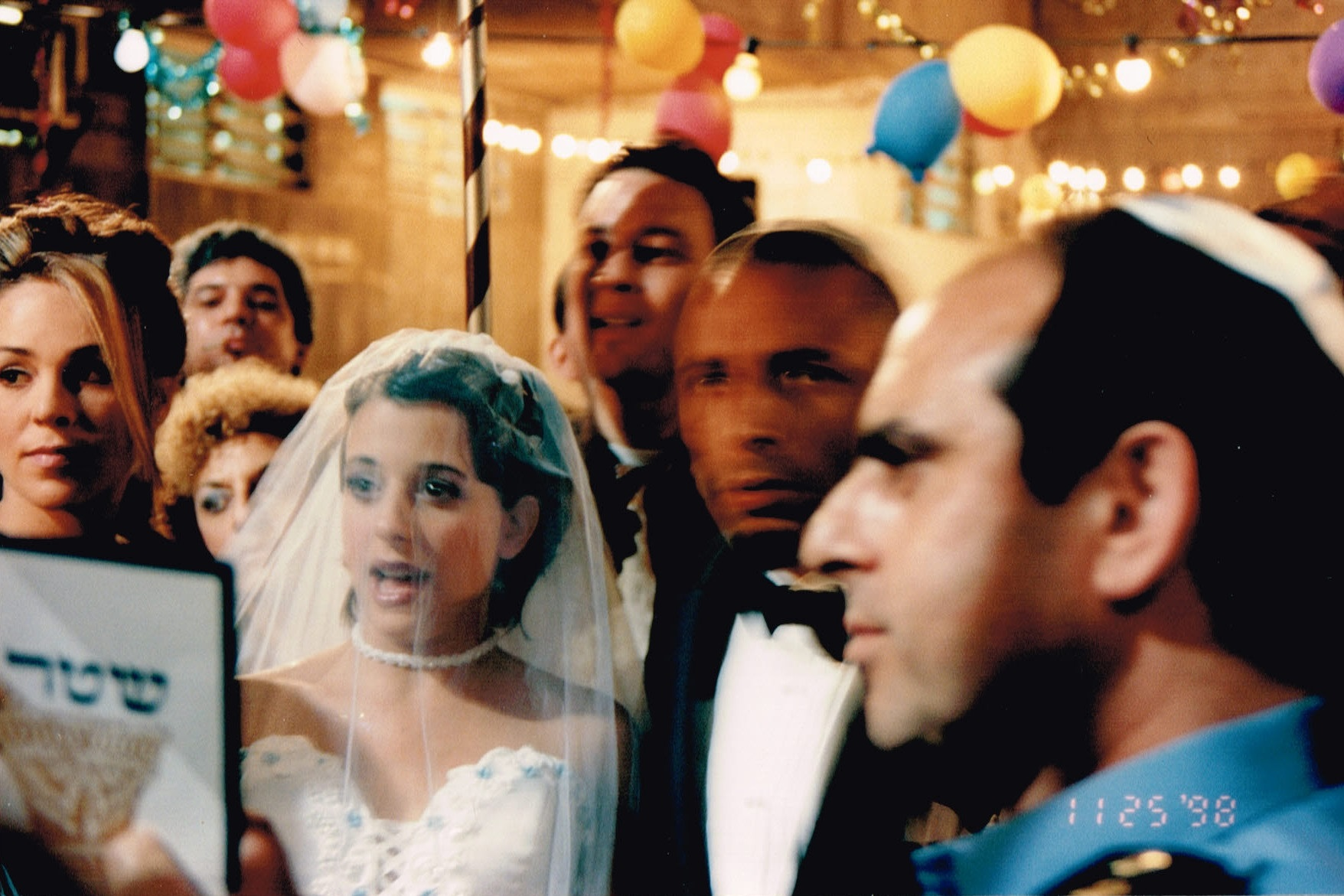 לירית מאש בתפקיד לונה בסדרת הטלוויזיה זינזאנה